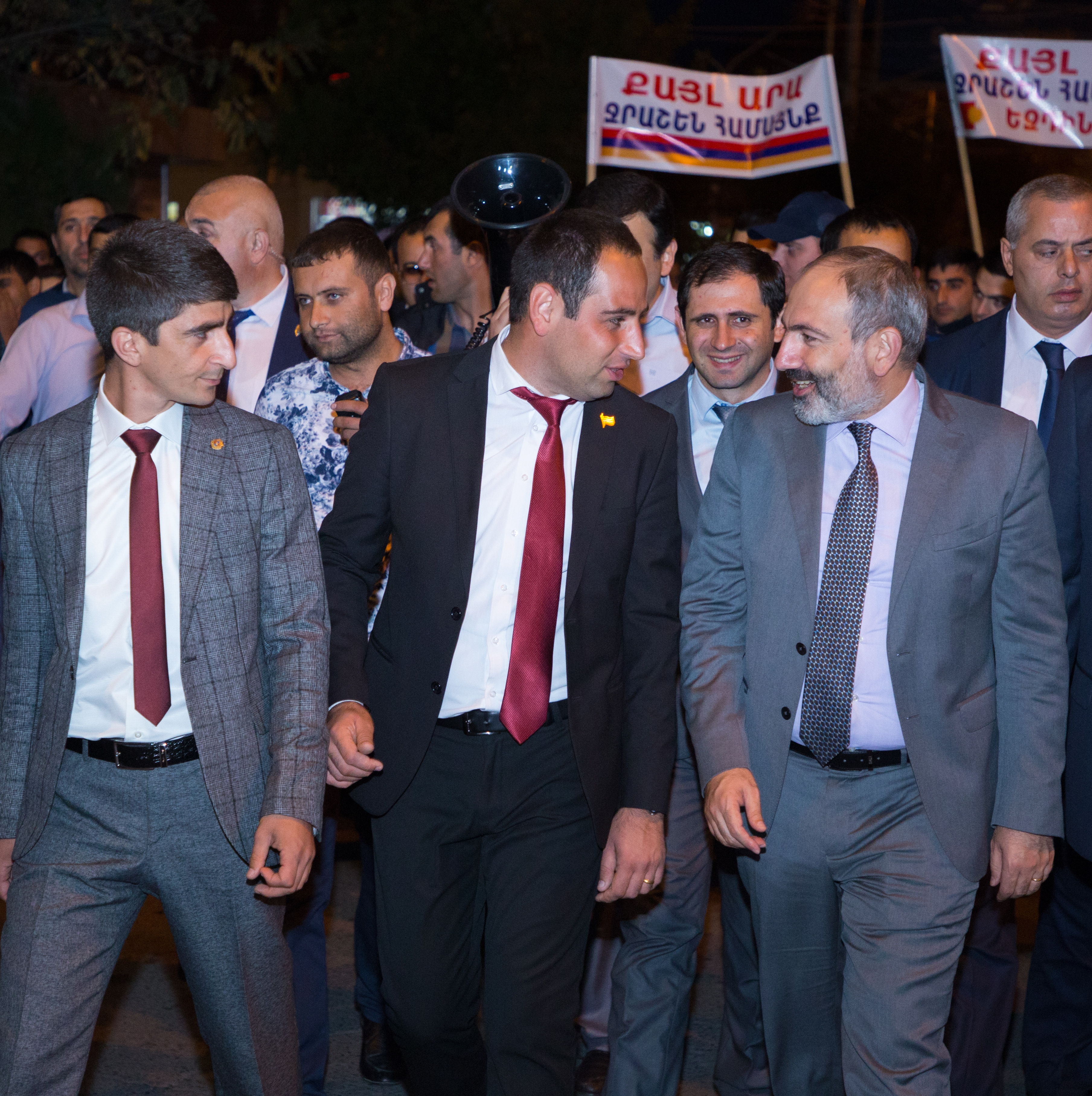 Դ. Խուդաթյան. քարոզարշավ